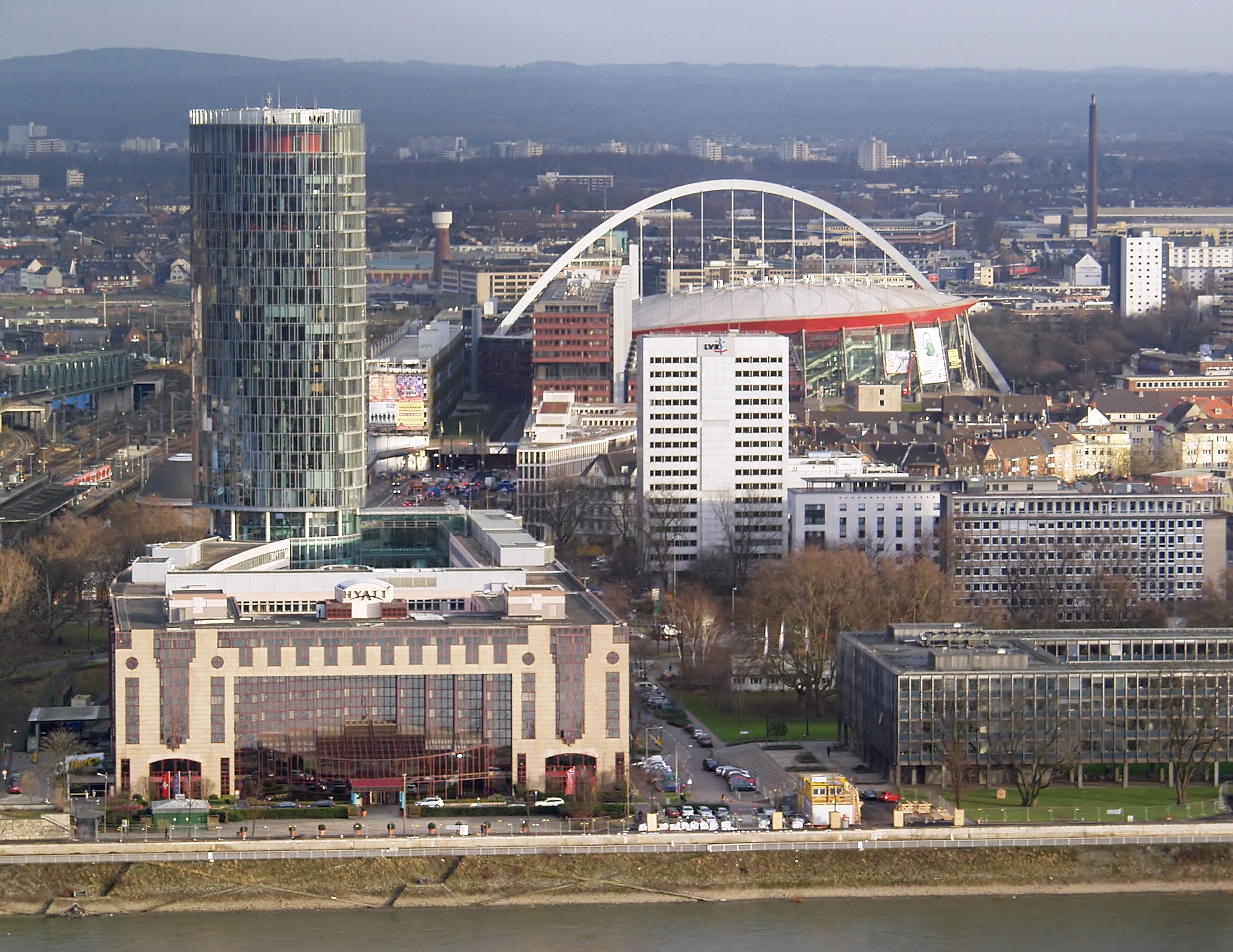 Köln-Deutz: Vordergrund: Hyatt Regency, dahinter der KölnTriangle, in der Mitte Hintergrund die Lanxess Arena